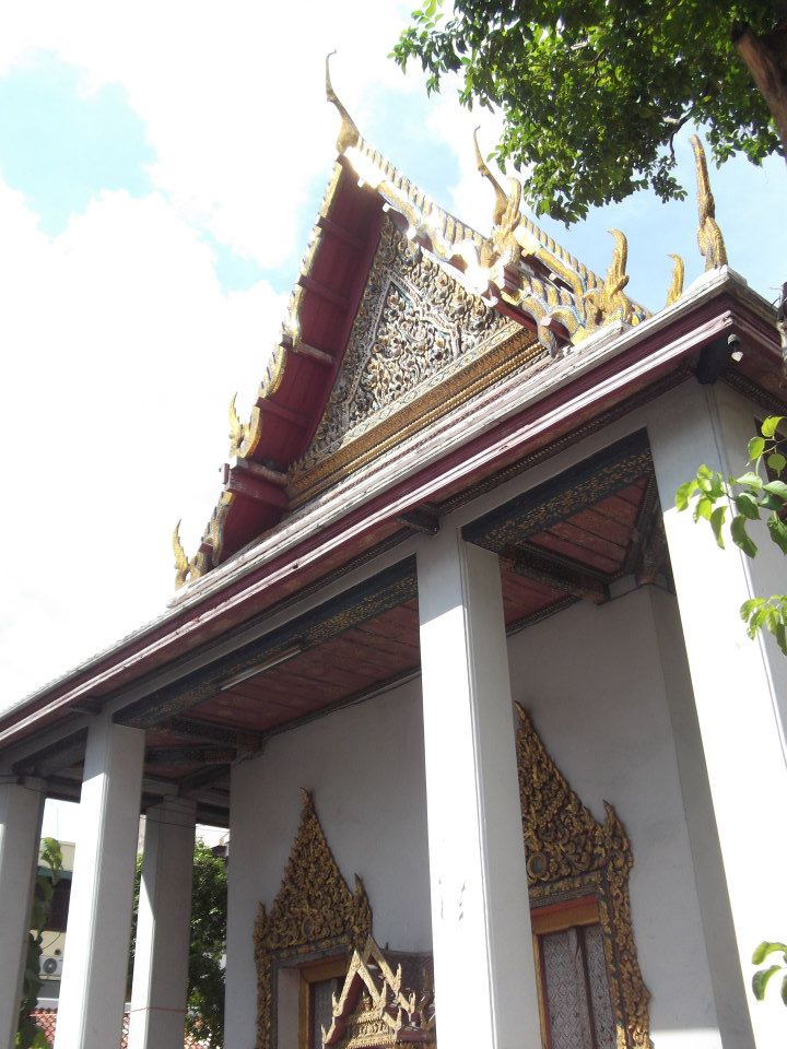 วัดกันมาตุยาราม